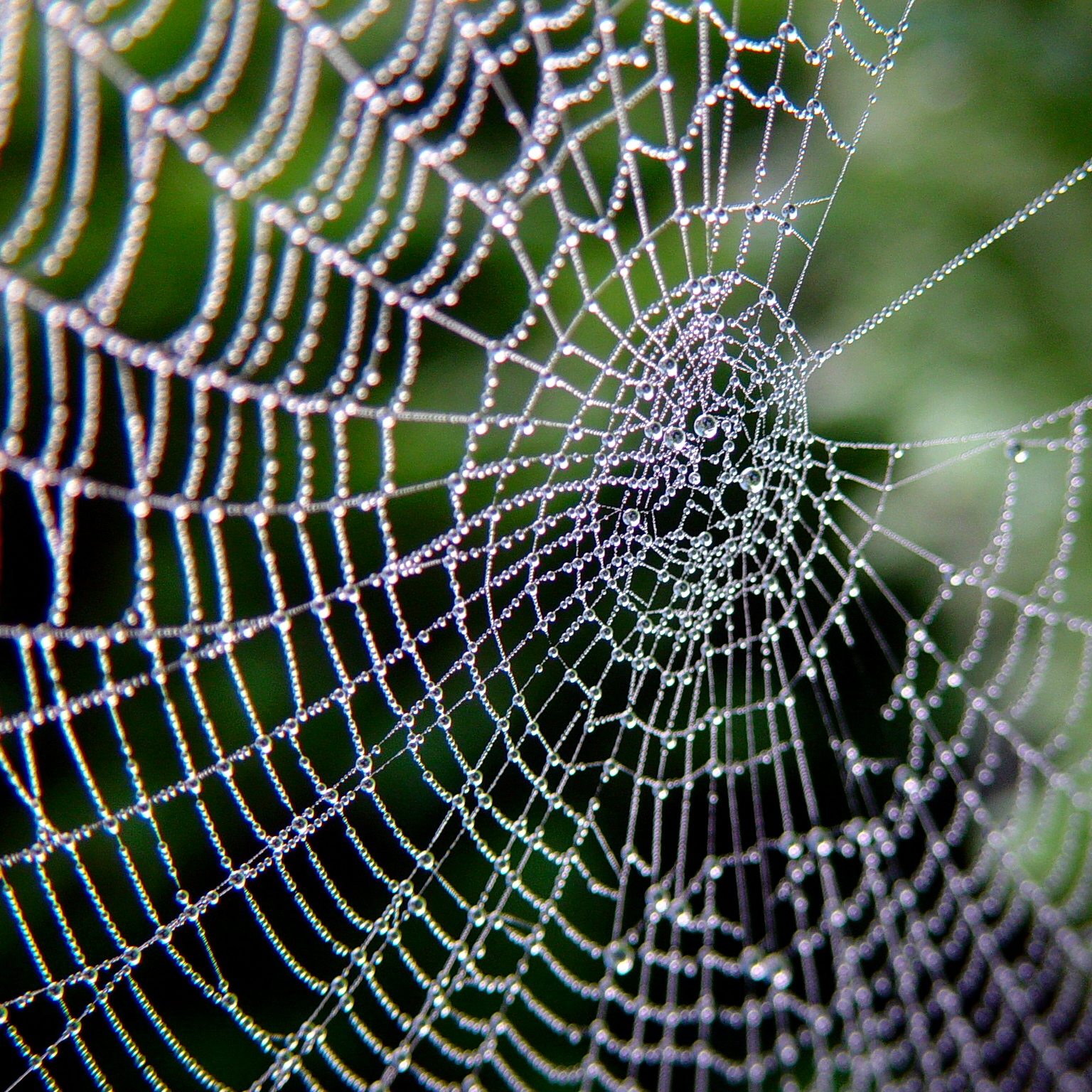 Spider web